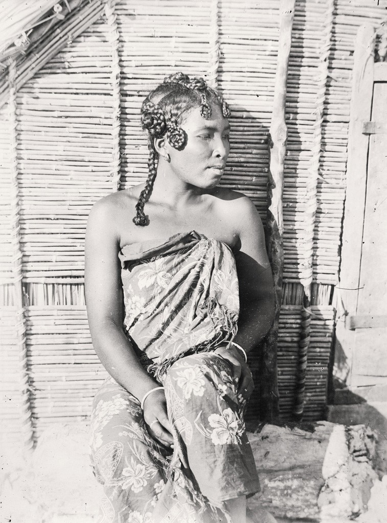 Femme sakalave, 1900/1910.